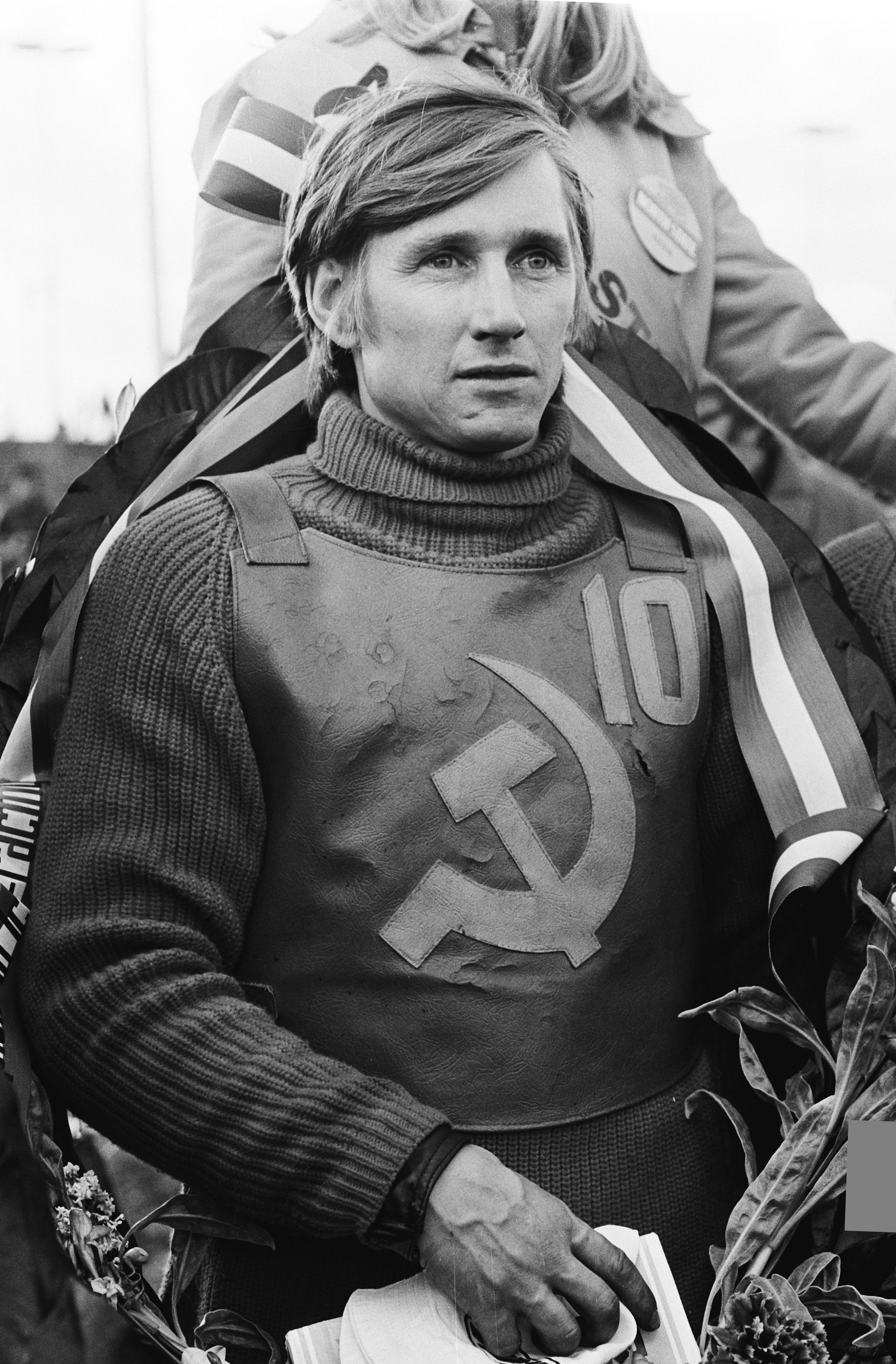 Finale ijsspeedway in Assen; de Rus Tarabensko tijdens huldiging (kop)